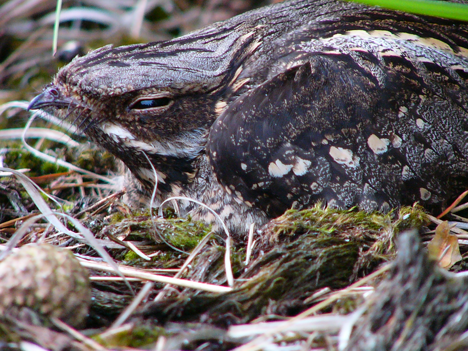 nachtschwalbe Caprimulgus europaeus